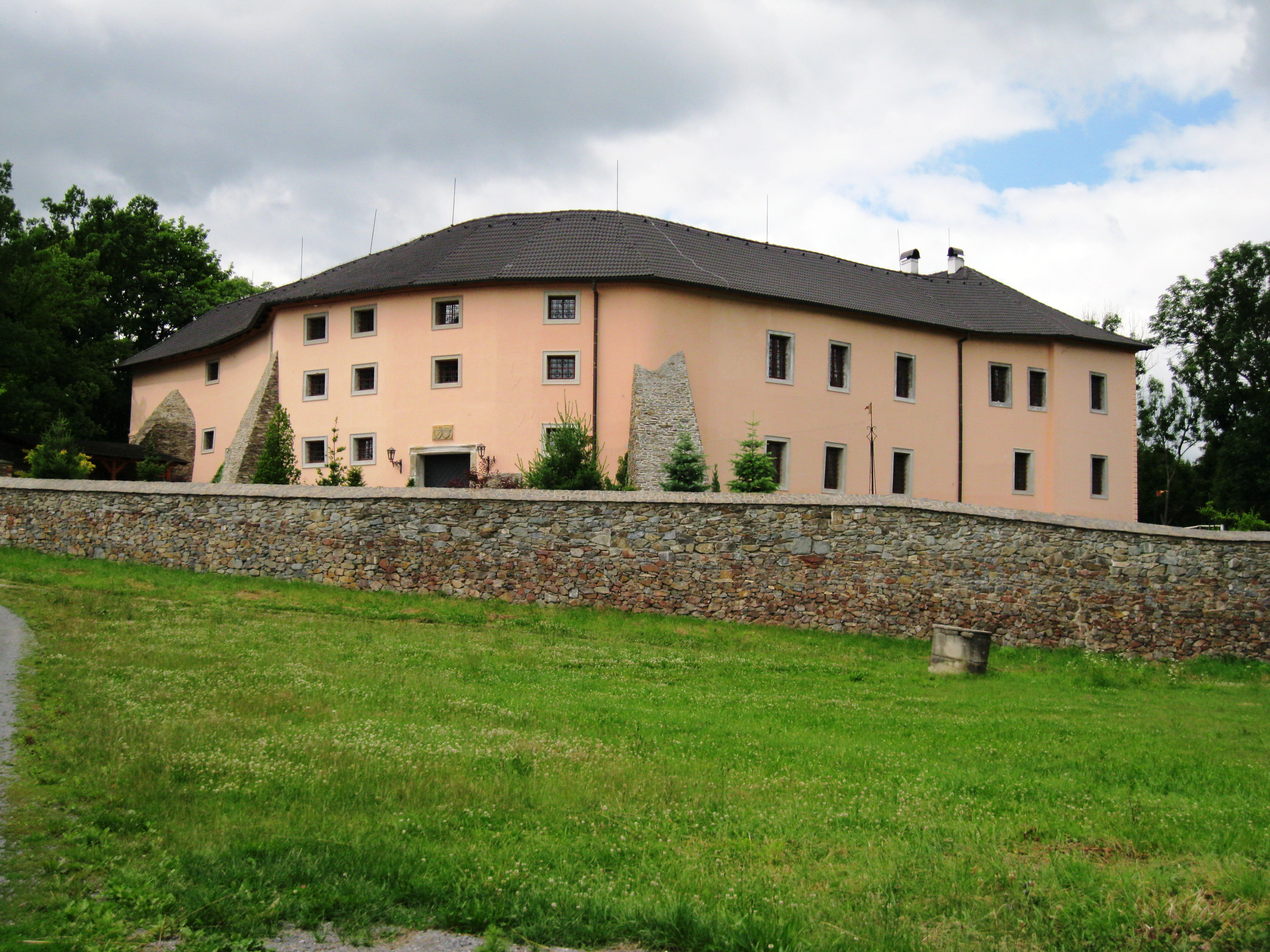 Zámek Krakovec na Moravě